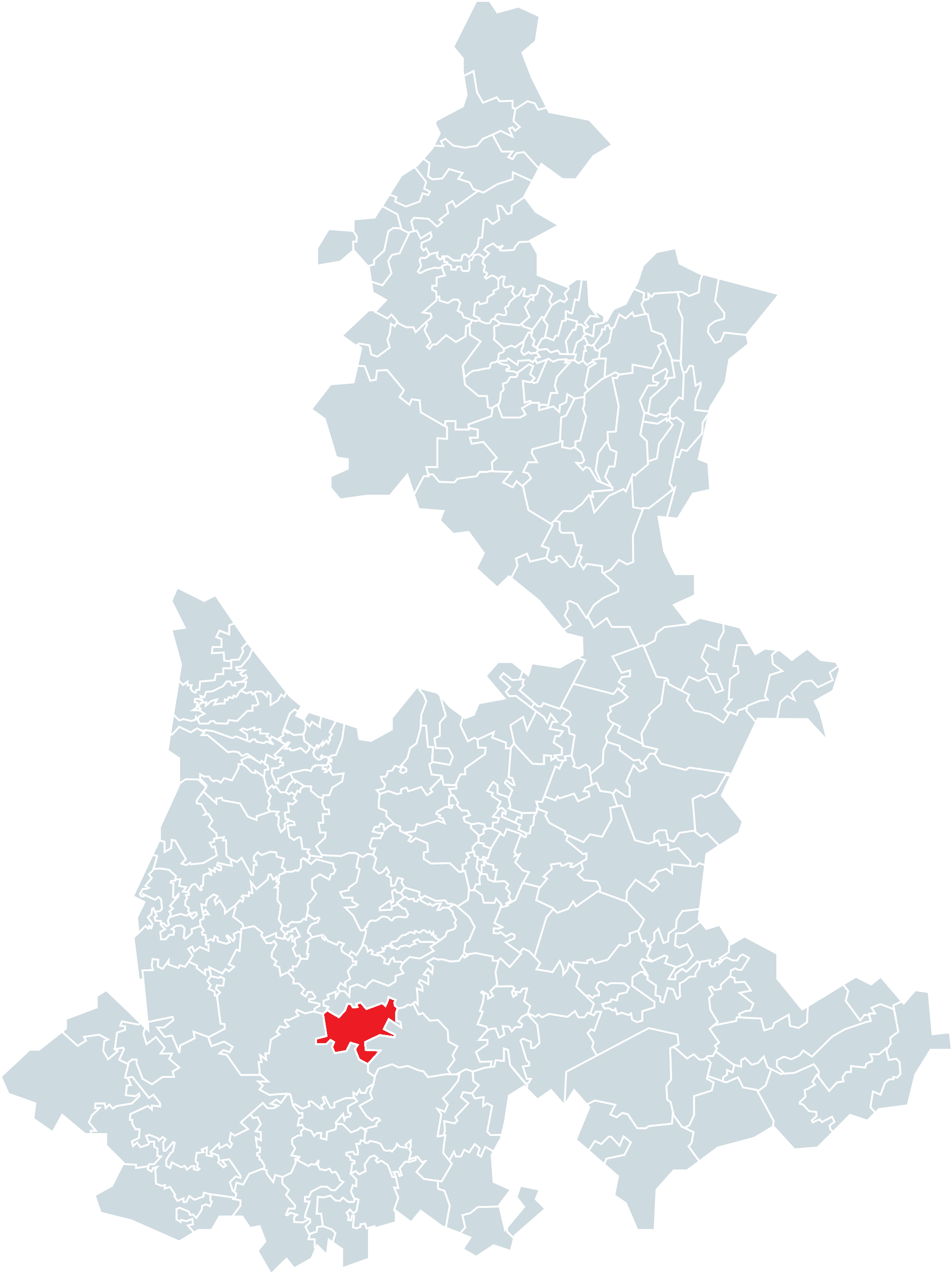 Municipio de Coayuca de Andrade